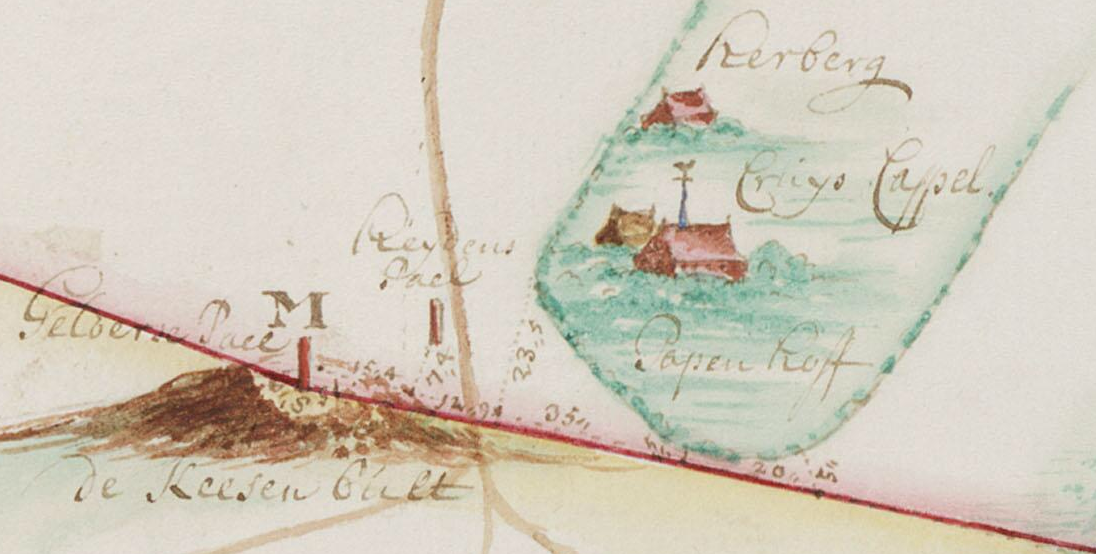 Detail grens Aalten-Hemden tussen Gelre en Münster